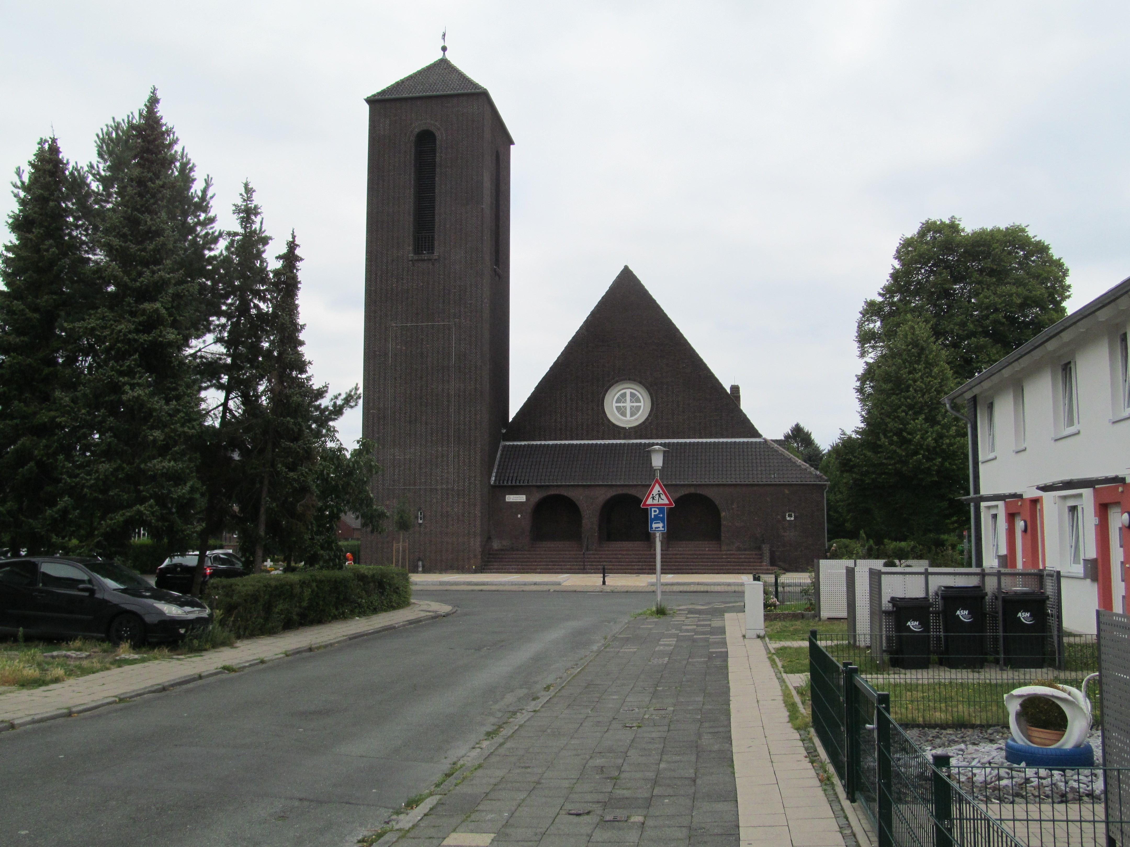 Blick aus der Elbinger Straße in Hamm auf die Johanneskirche